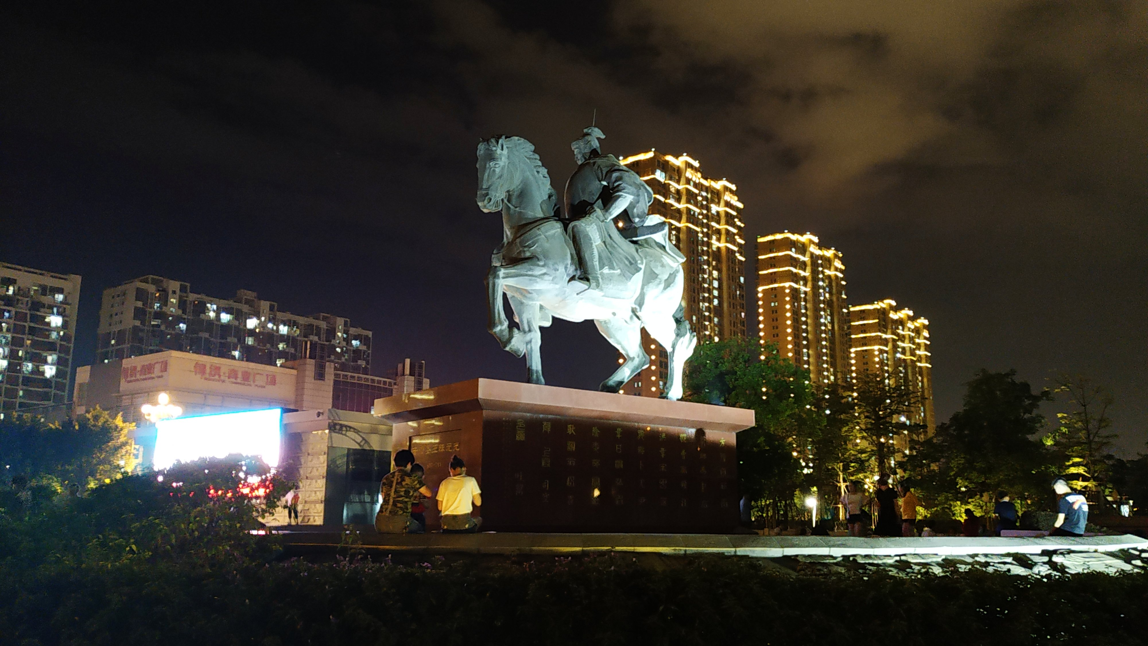 中文（中国大陆）: 漳州人民广场